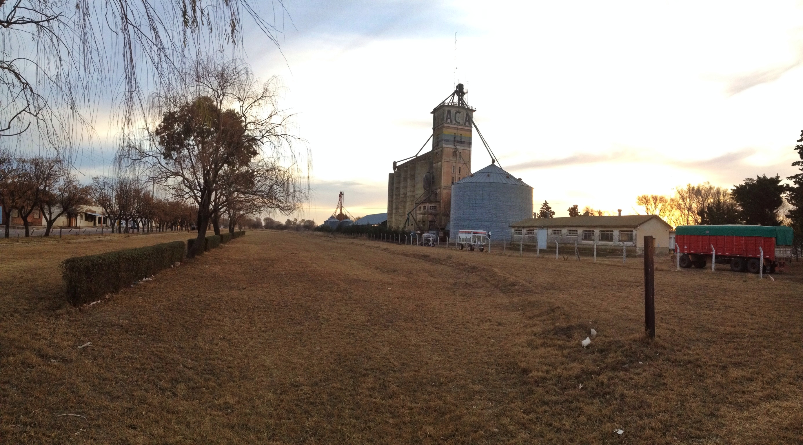 Silo de cereal en Eduardo Castex, La Pampa, Argentina